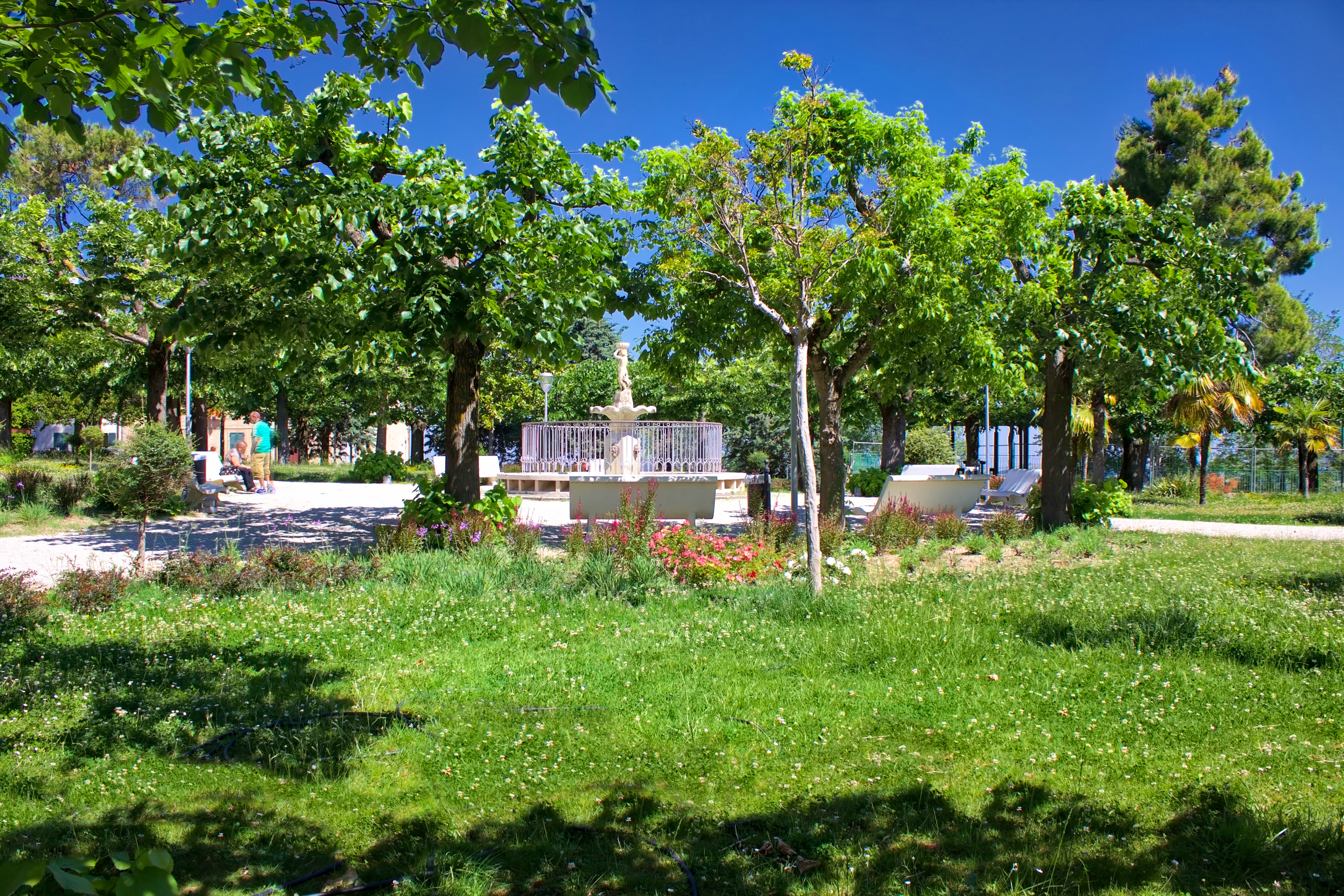 Passeggiate nel verde a Carassai nelle Marche